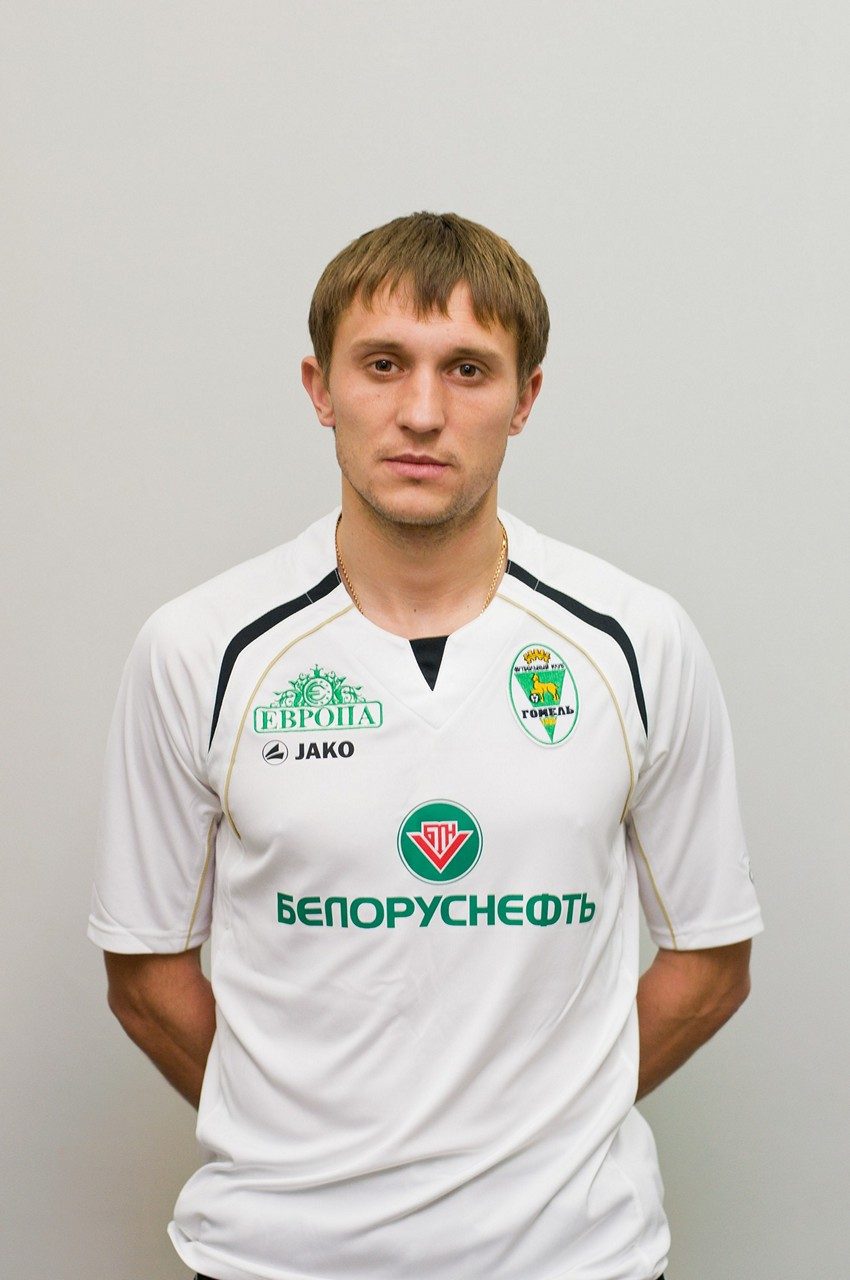 Михаил Афанасьев